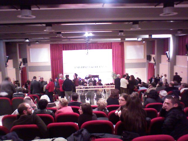 The main auditorium at Enna University-l'auditorium principale dell'università di Enna